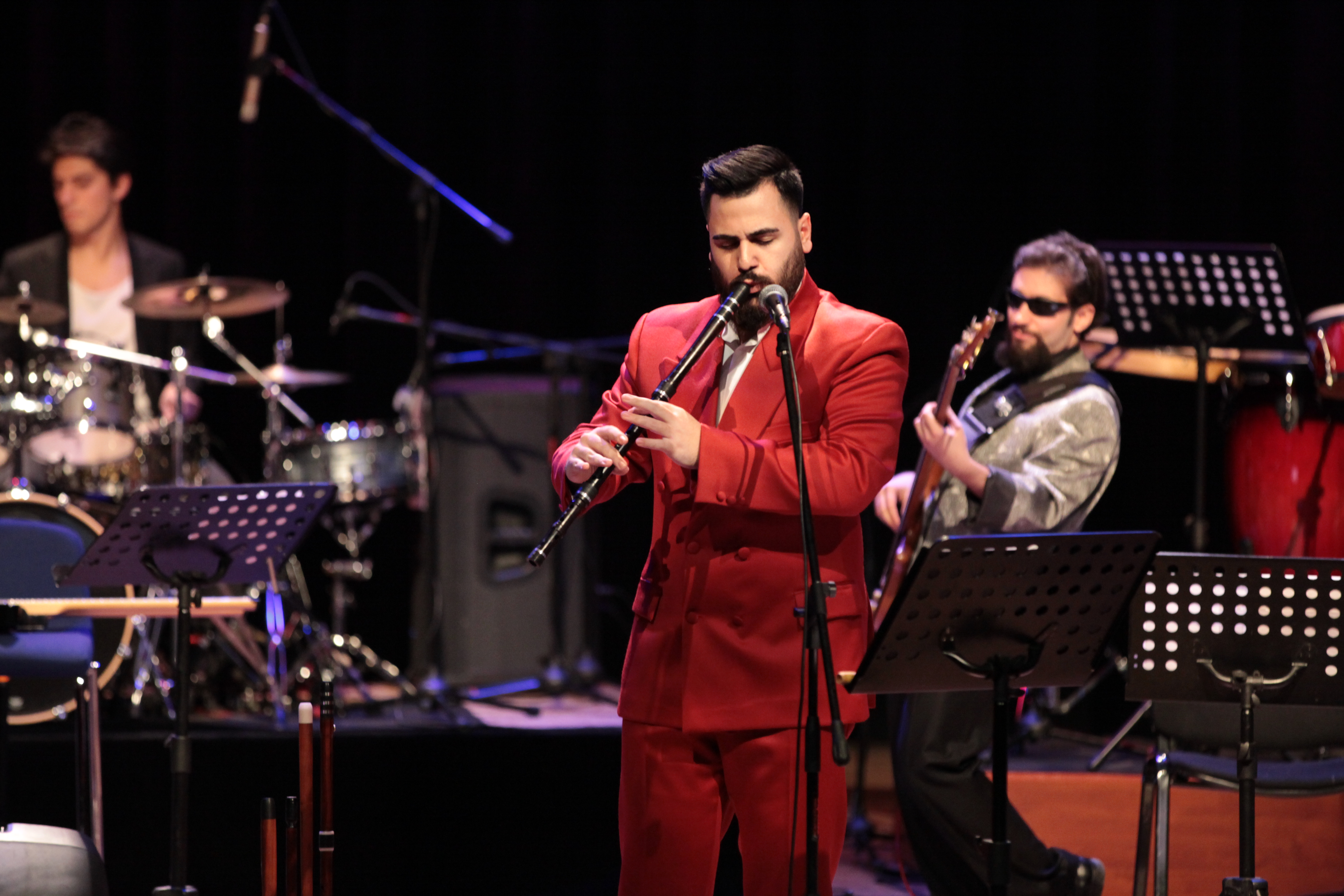 Batuhan Aydın performans (Istanbul, 2016)